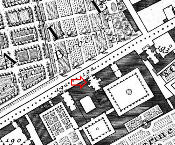 Pianta di Nolli